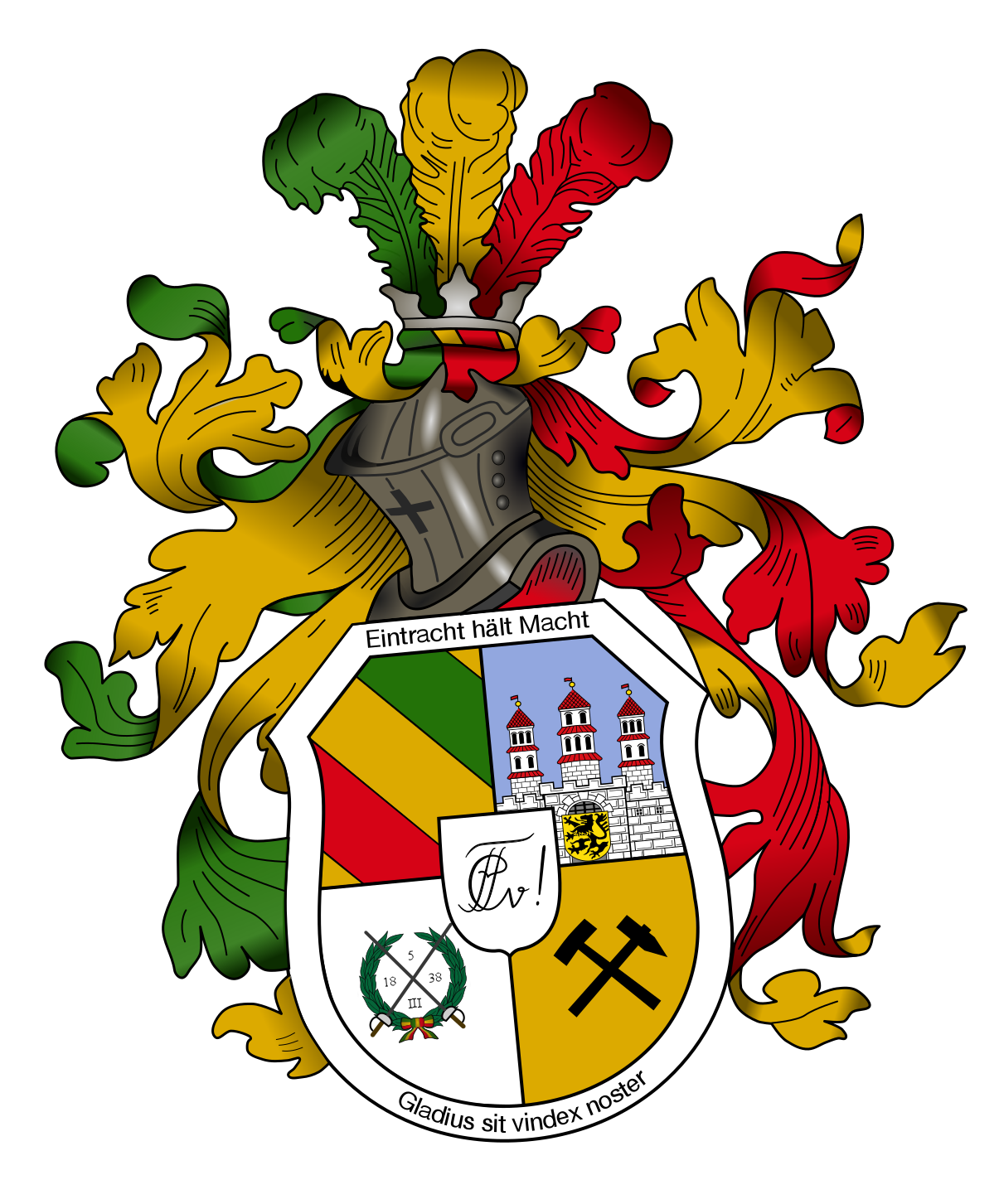 Wappen des Weinheimer Corps Franconia Fribergensis zu Aachen